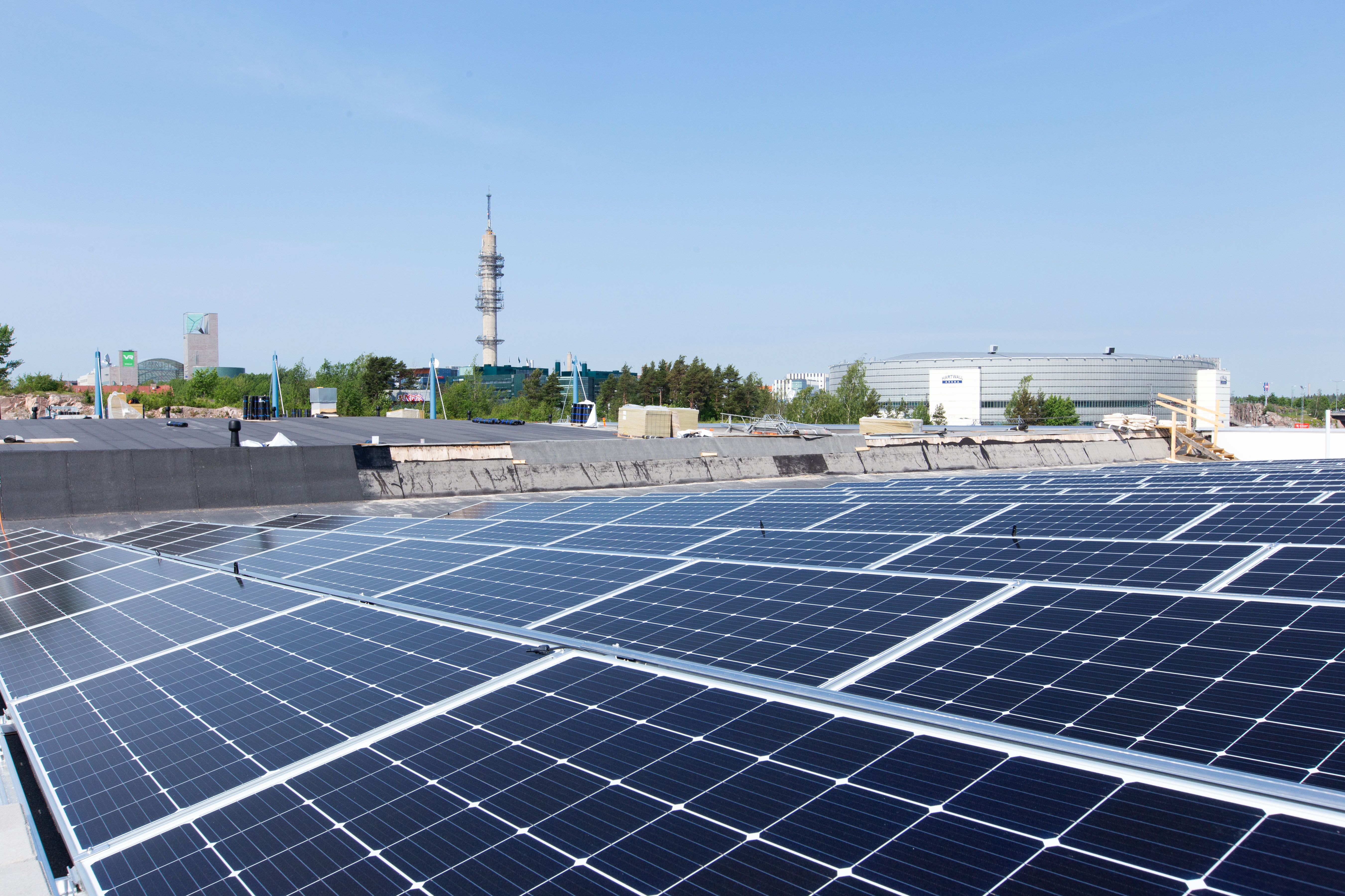 Aurinkopaneelit Messukeskuksen hallin katolla.